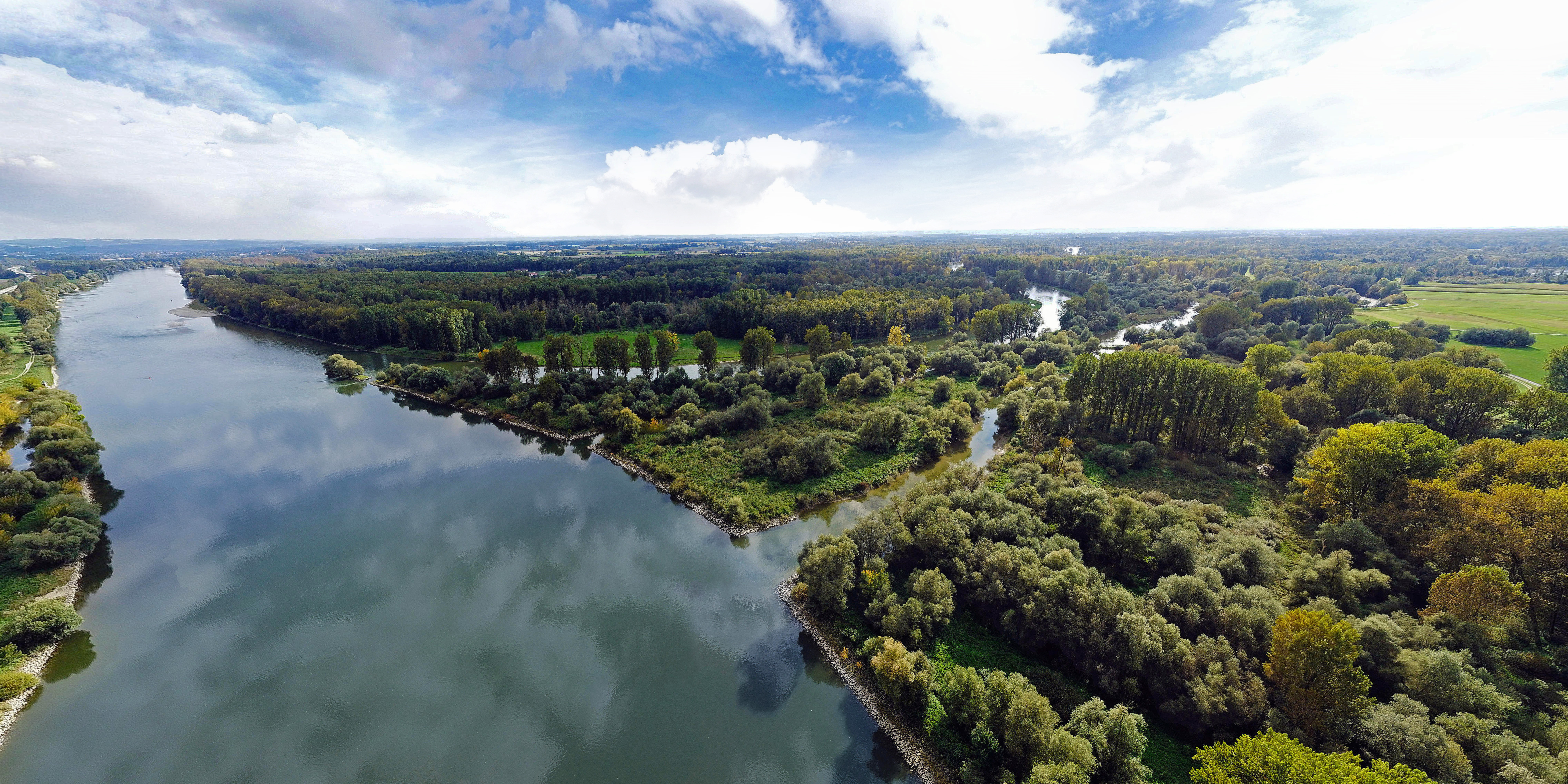 (NSG:BY-NSG-00369.01)_Isarmündung